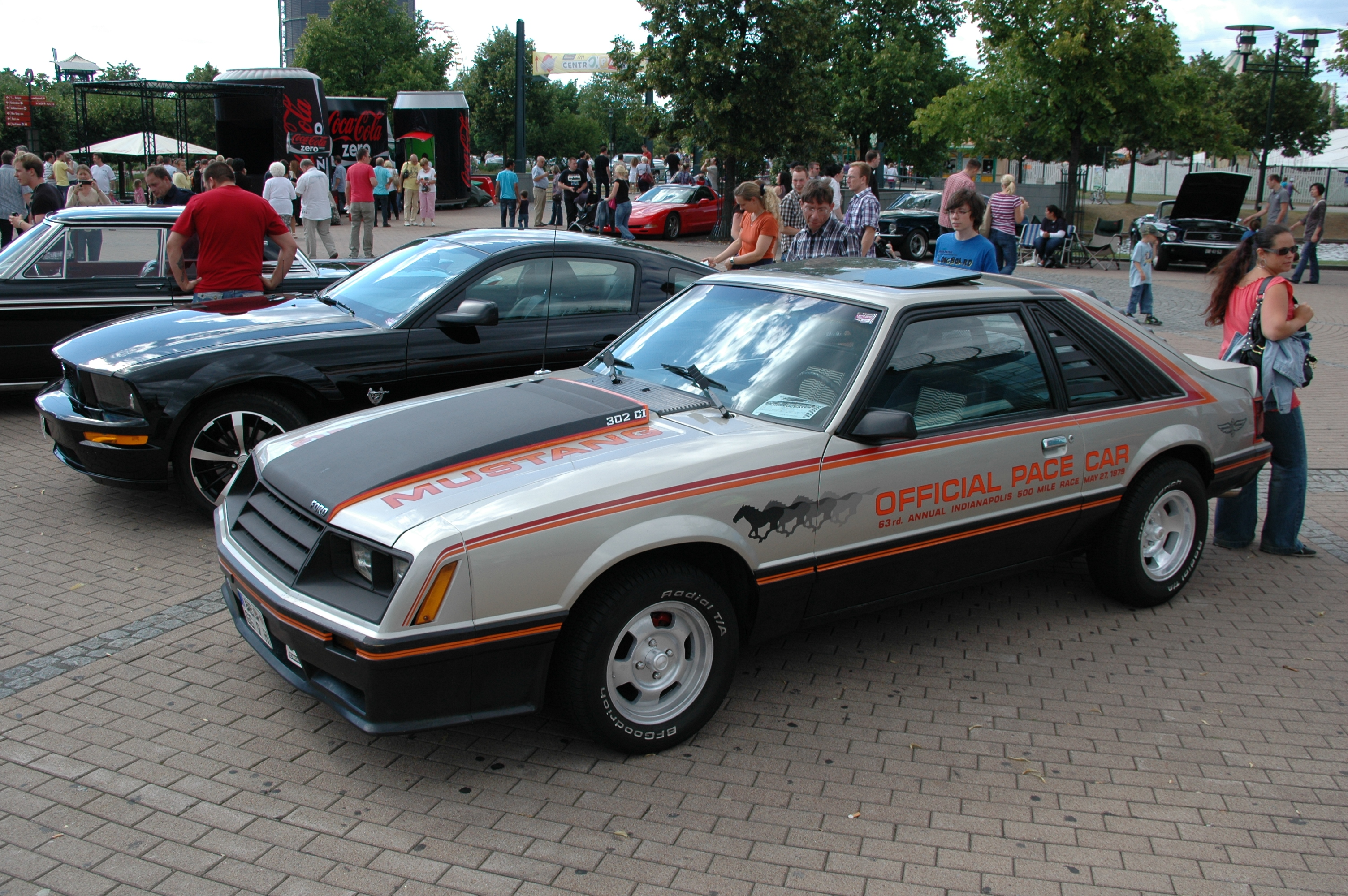 Oberhausen_Gasometer_2010-07-24 16-45-00